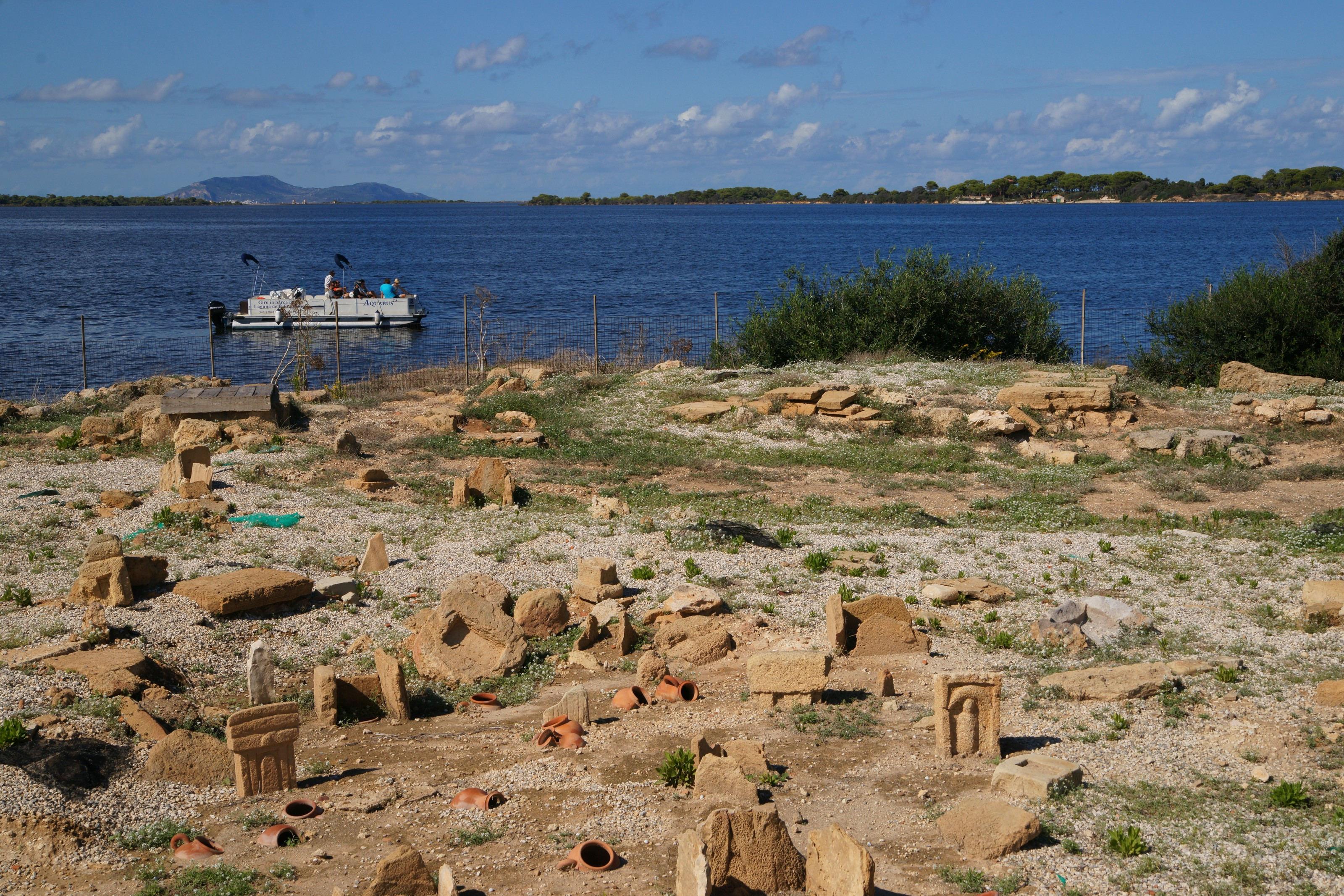 Tophet